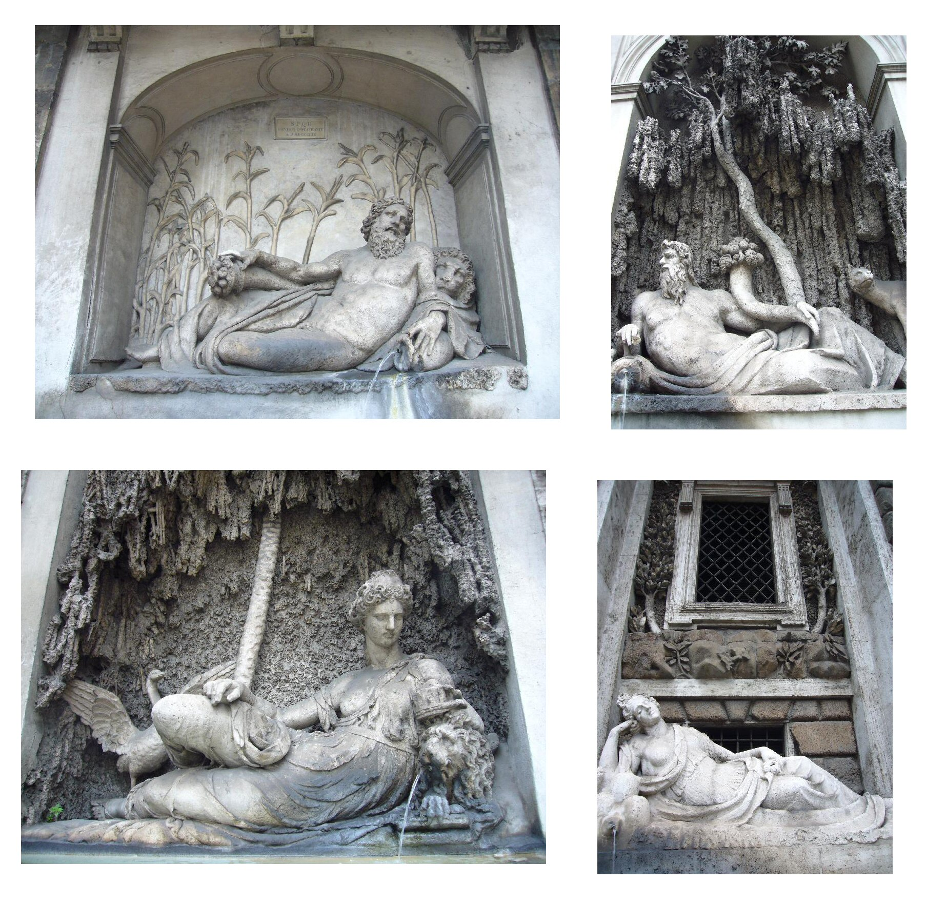 Roma, le Quattro fontane: Arno, Tevere, Giunone, Diana